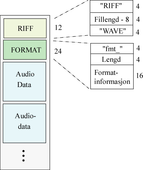 Strukturen i ei wave-fil.